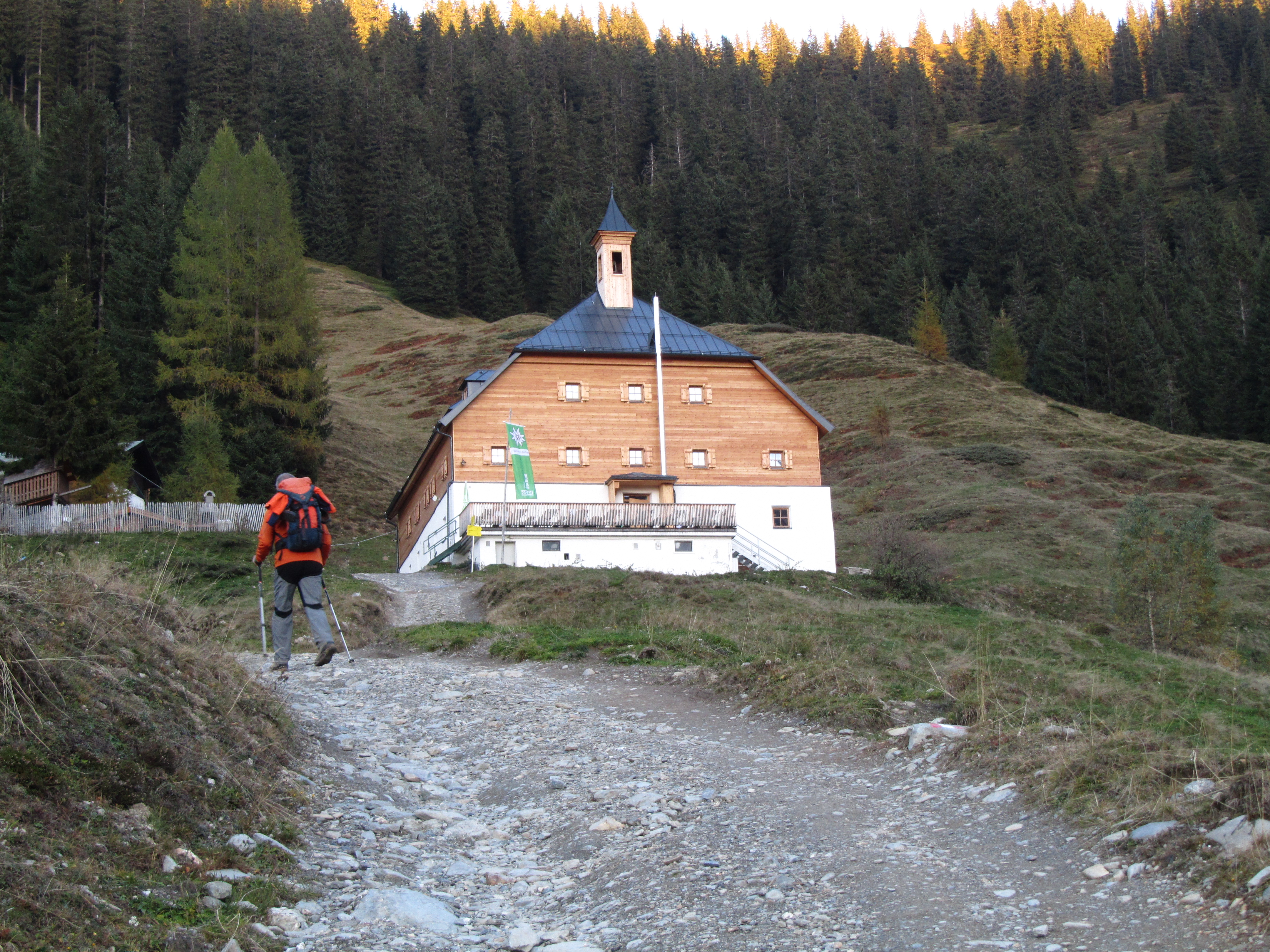 Die Bochumer Hütte (Kelchalm) in den Kitzbüheler Alpen This media shows the remarkable cultural object in the Austrian state of Tyrol listed by the Tyrolean Art Cadastre with the ID 82170. (on tirisMaps, on tirisdienste.at, pdf, more images on Commons)